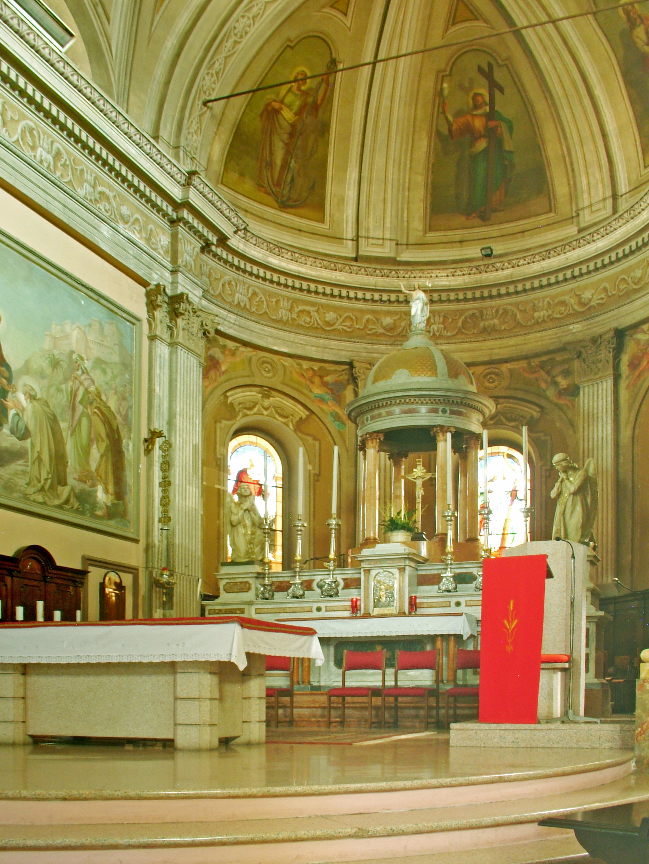 Arese - Chiesa parrocchiale dei Santi Pietro e Paolo: il presbiterio.